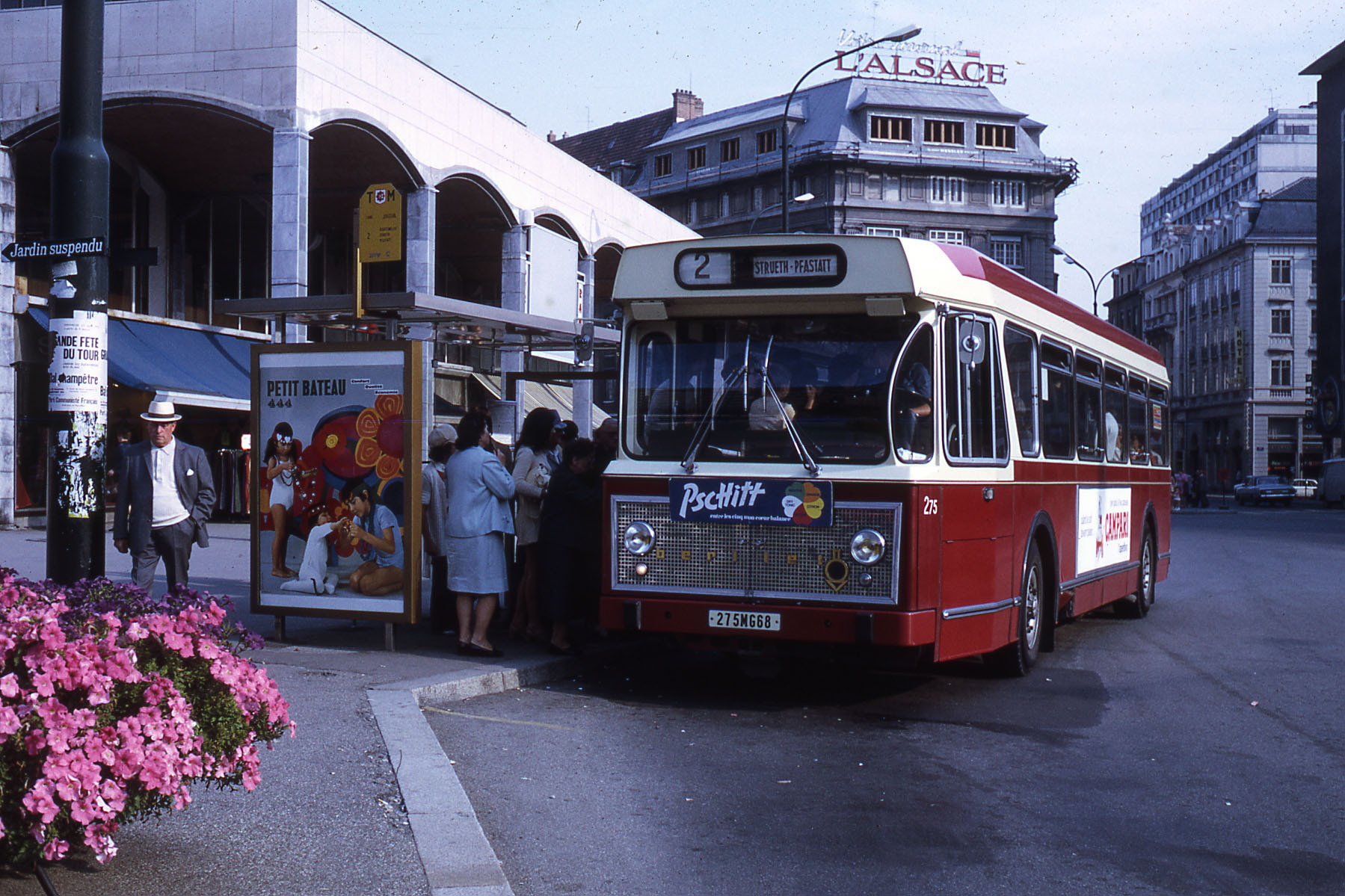 Bus Berliet de la TCM (Transport en commun de Mulhouse, devenue Soléa), ligne 2, stationné Porte Jeune à Mulhouse, 1971